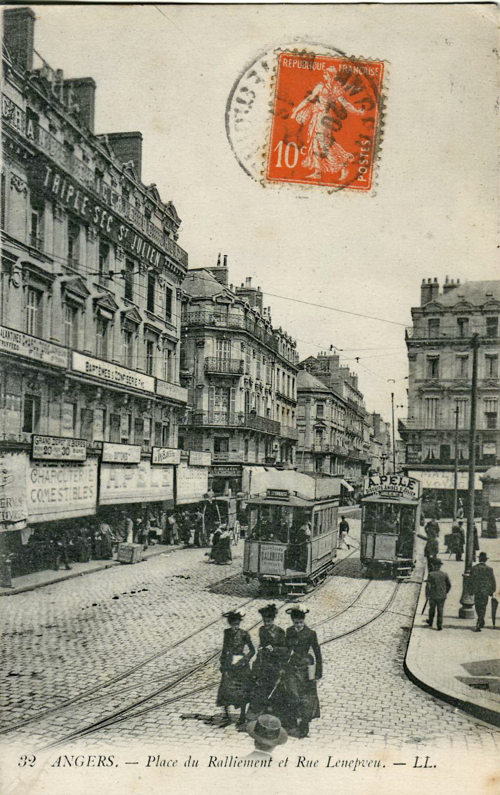 Carte postale ancienne éditée par LL, n°32 :ANGERS - Place du Ralliement et rue Lenepveu